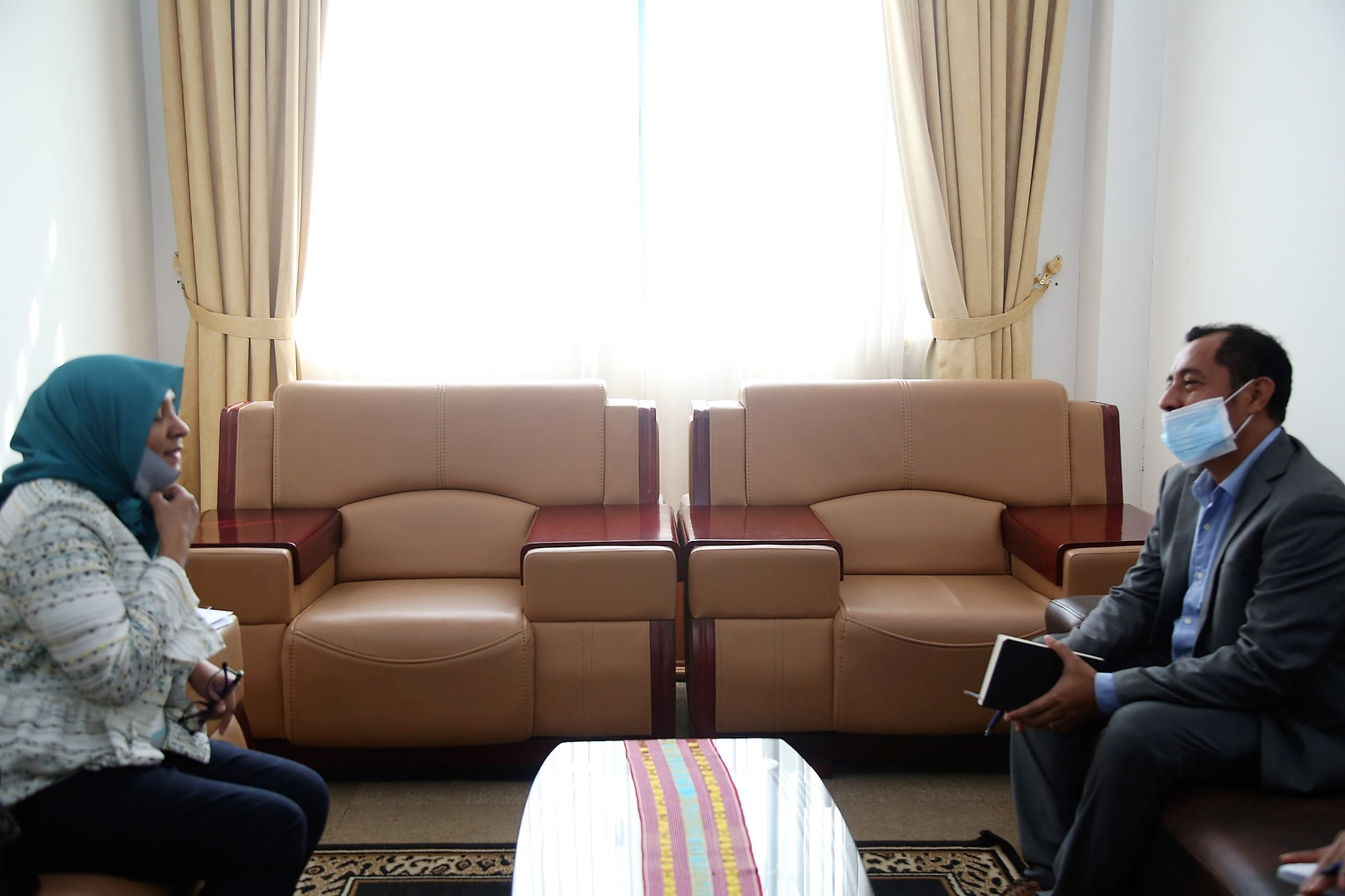 Sarimah Akbar und Joaquim Chaves im Außenministerium Osttimors.